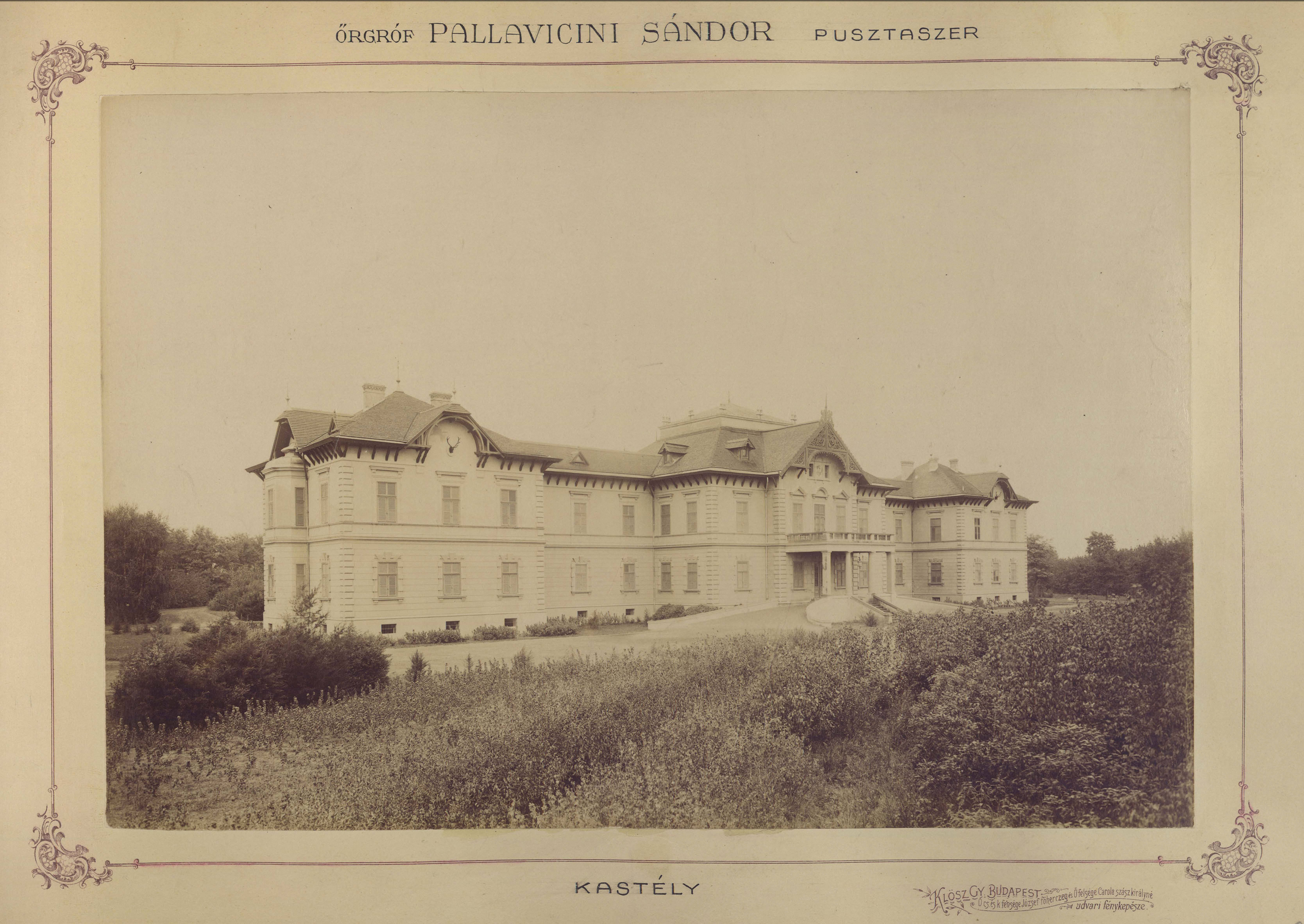 (ekkor Sövényháza) Pallavicini-kastély. A felvétel 1895-1899 között készült. A kép forrását kérjük így adja meg: Fortepan / Budapest Főváros Levéltára. Levéltári jelzet: HU.BFL.XV.19.d.1.12.166 Location: Hungary Tags: castle Title: (ekkor Sövényháza) Pallavicini-kastély. A felvétel 1895-1899 között készült. A kép forrását kérjük így adja meg: Fortepan / Budapest Főváros Levéltára. Levéltári jelzet: HU.BFL.XV.19.d.1.12.166